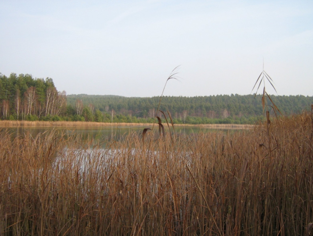 Foto des 7 ha großen Luchsees, des Kolks des gleichnamigen Kesselmoores in den Krausnicker Bergen im „Landkreis Dahme Spreewald“ in „Brandenburg“, „Deutschland“